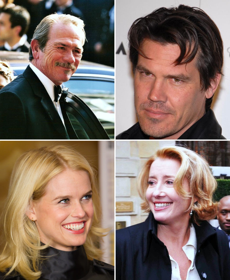 (dall'alto a sinistra, in senso orario) parte del cast del film Men in Black 3 di Barry Sonnenfeld (2012). Tommy Lee Jones e Josh Brolin, interpreti del personaggio dell'agente K rispettivamente nel 2012 e nel 1969, ed Emma Thompson e Alice Eve, interpreti del personaggio dell'agente O rispettivamente nel 2012 e nel 1969.